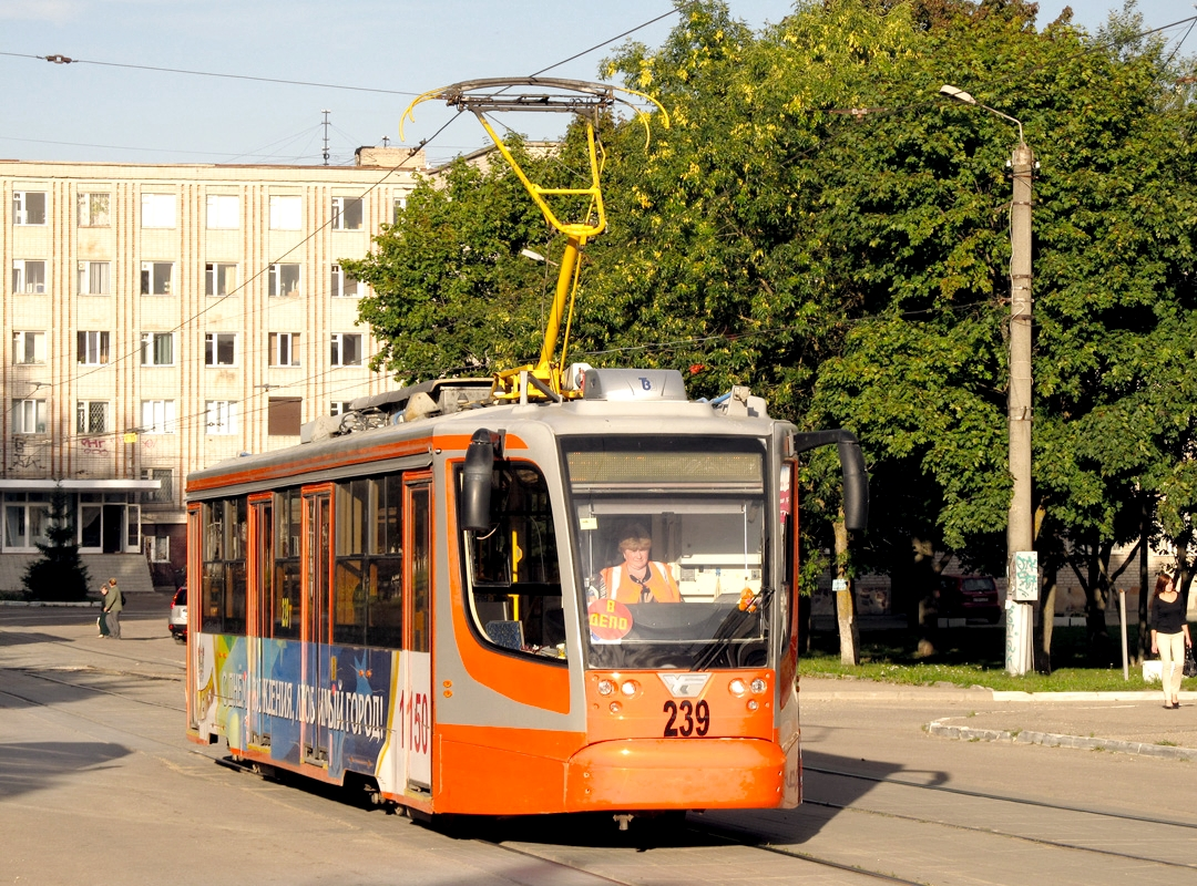 Смоленск 71-623 № 239